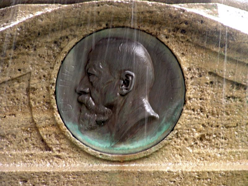 Rathausbrunnen in Leipzig, Portraitmedaillon Hugo Licht von Georg Wrba